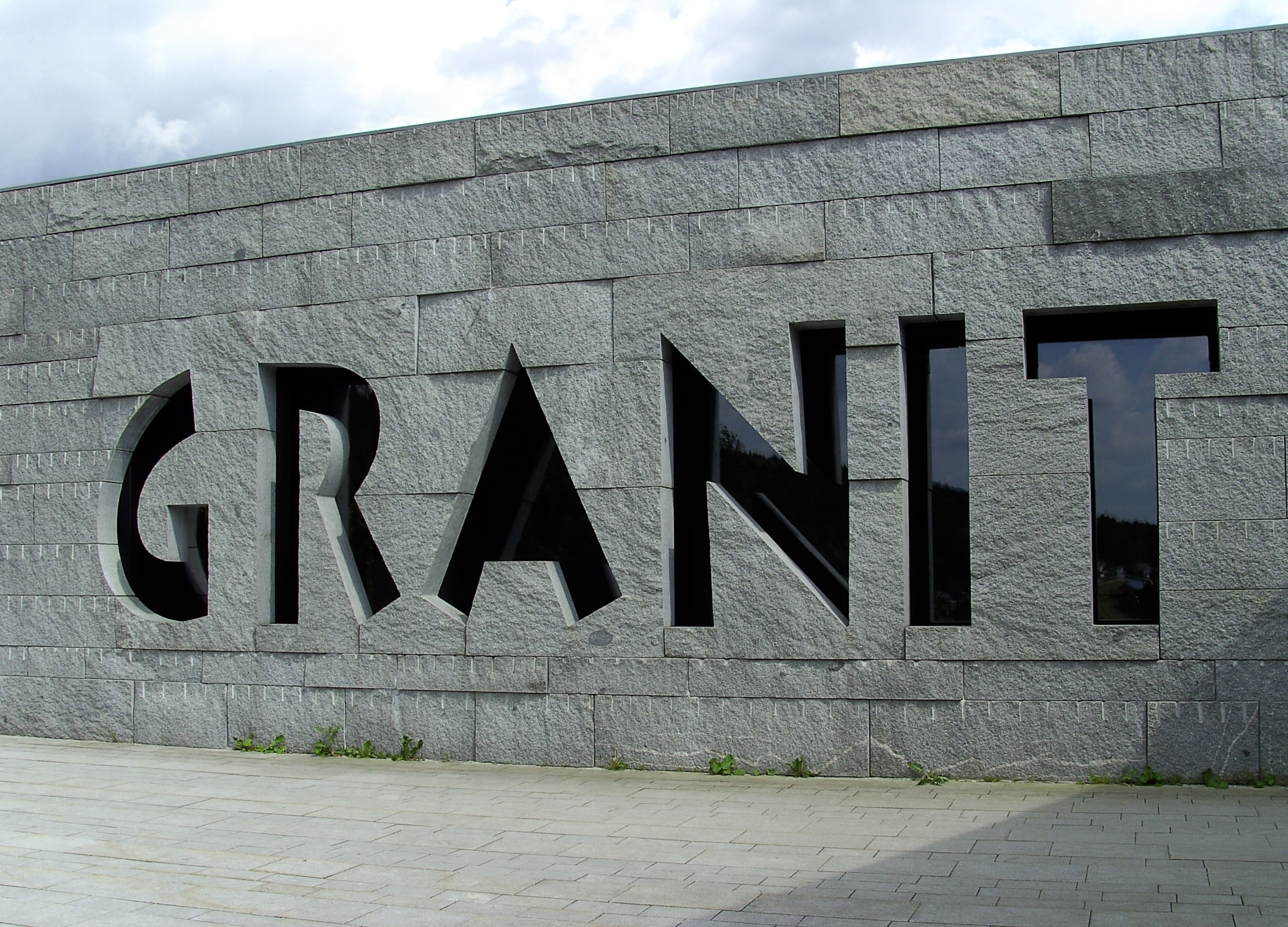 Eingangsbereich des Granitzentrums Hauzenberg, einem Museum, das sich der Geologie, Verarbeitung und der Abbaugeschichte des Natursteins Granit widmet.